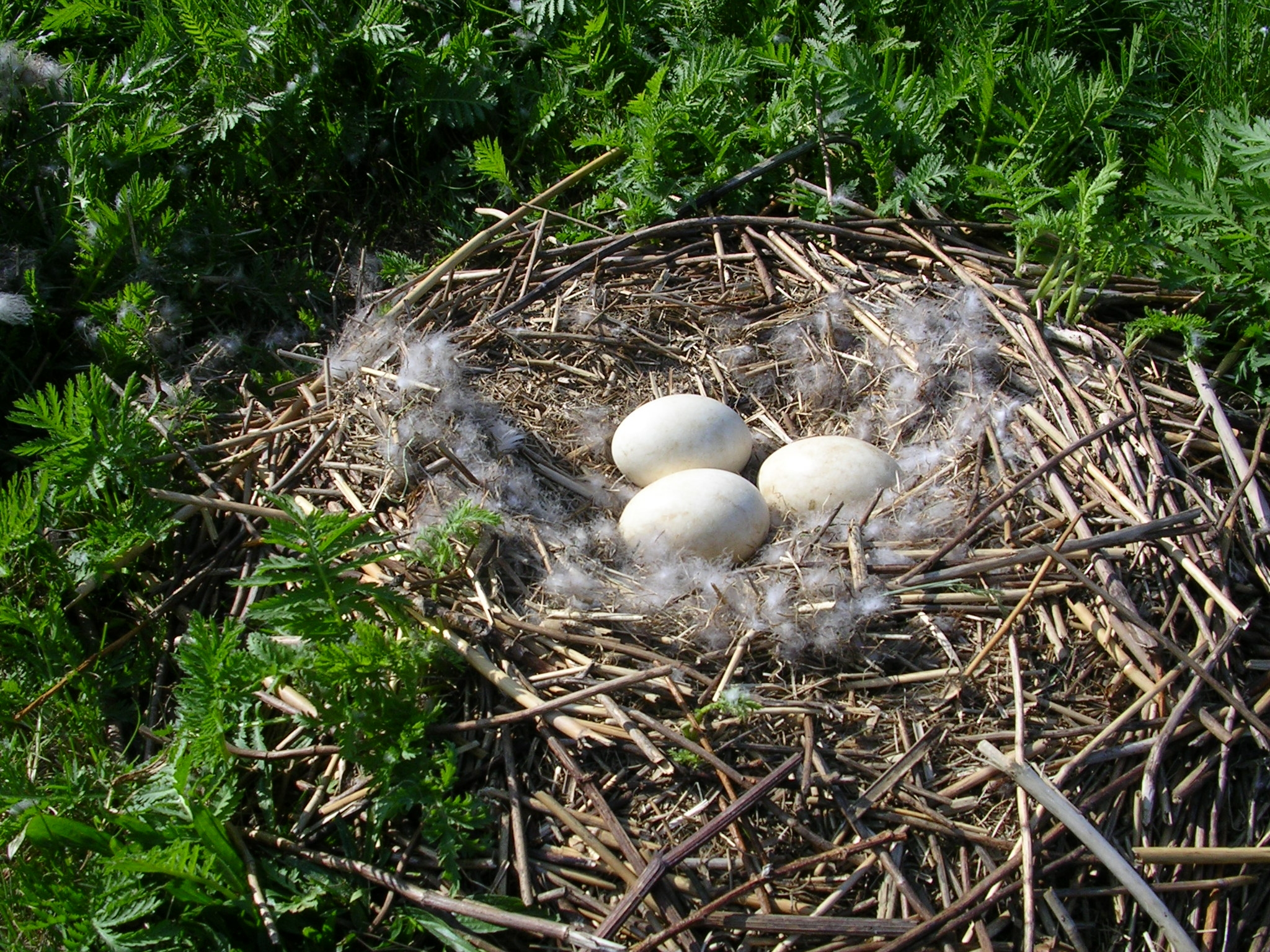 Gelege der Kanadagans (Branta canadensis)